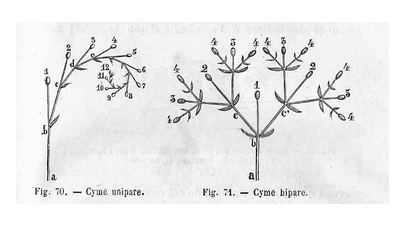 Cymes; shéma de cyme unipare & de cyme bipare